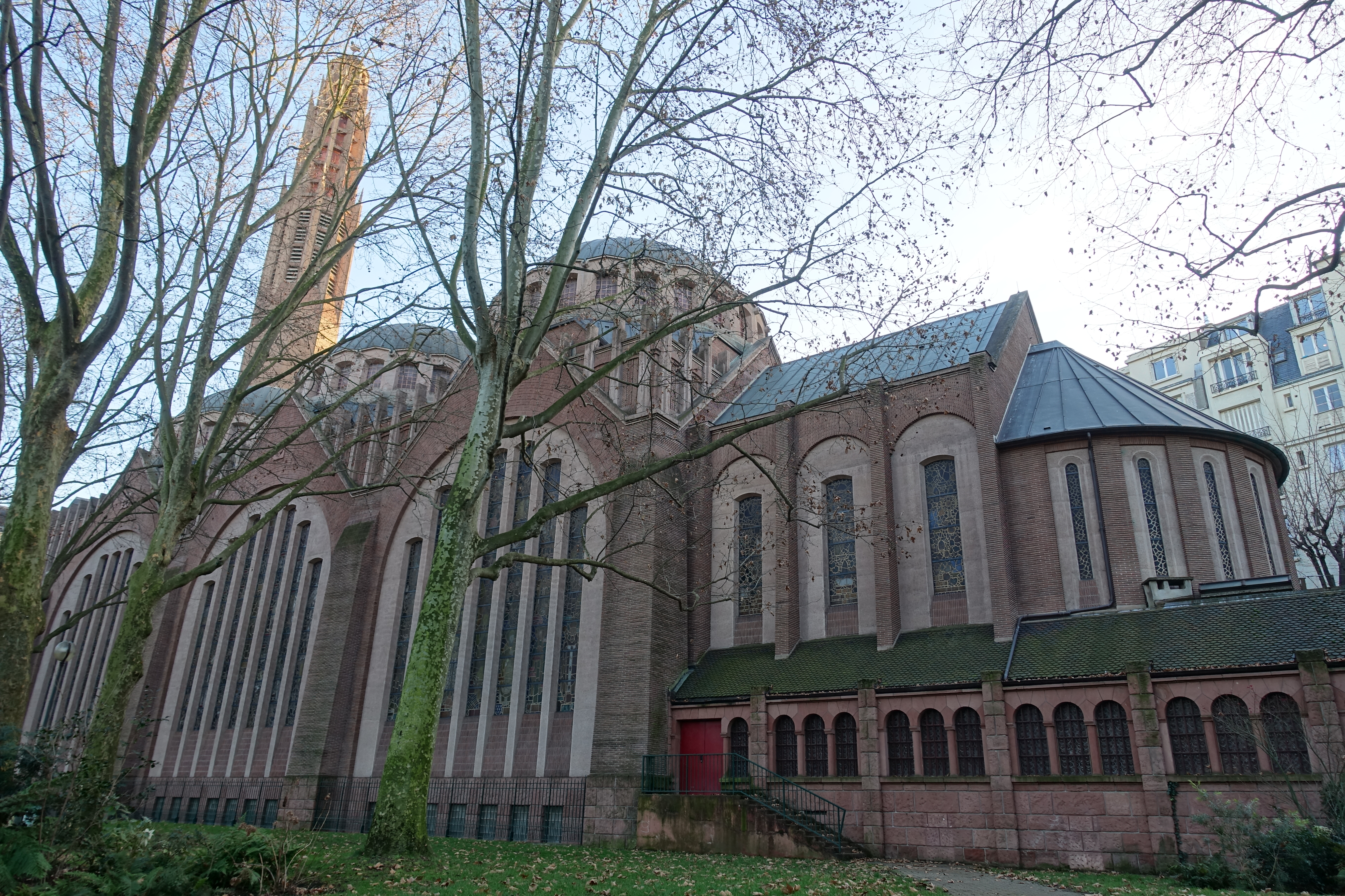 Eglise Sainte-Odile @ Square Sainte-Odile @ Paris 17 Église Sainte-Odile, 2 Avenue Stéphane Mallarmé, 75017 Paris, France.